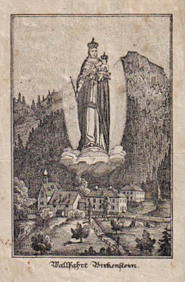 Wallfahrt zu Birkenstein, Bayern